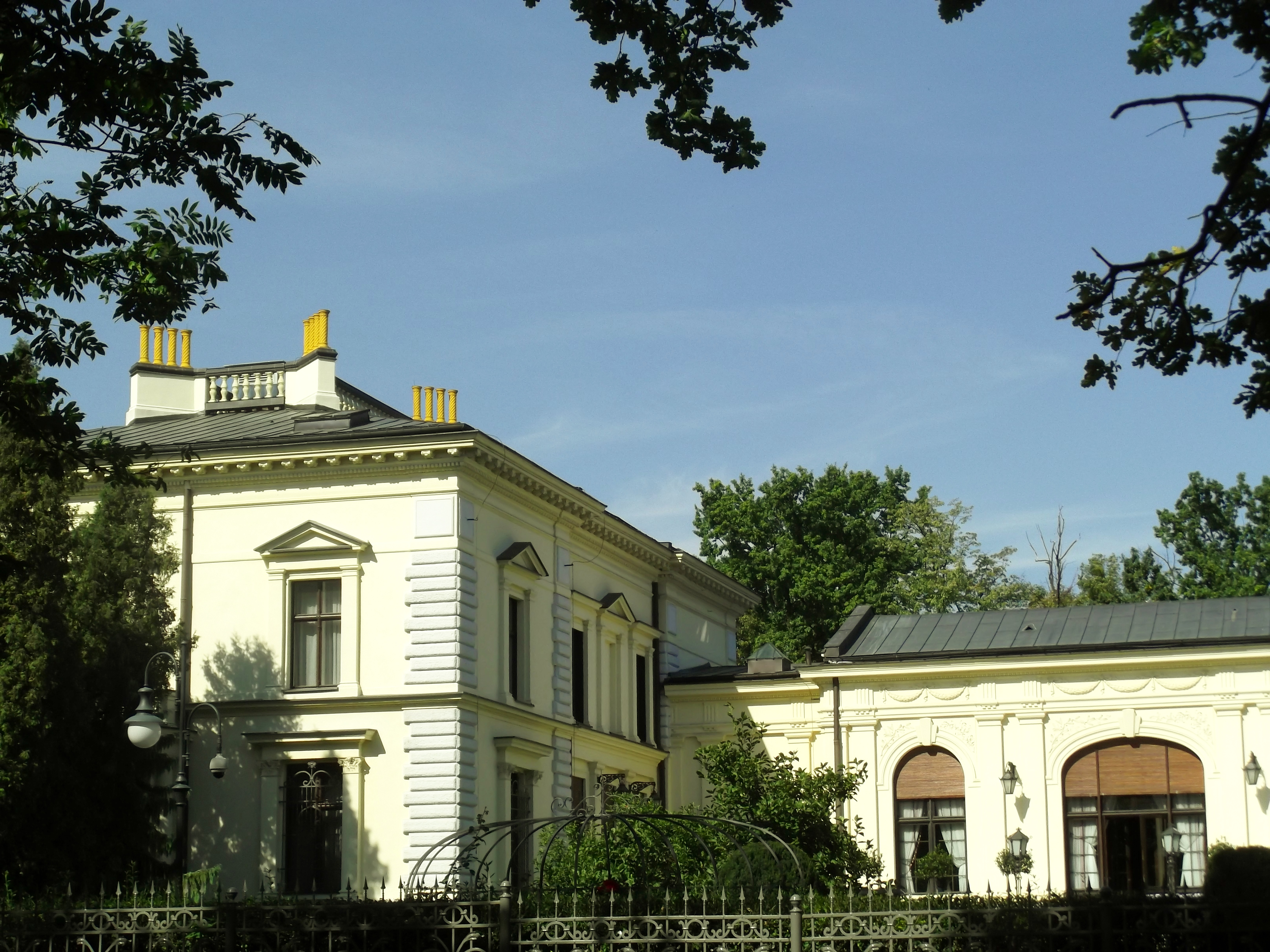 Łódź, pałac Edwarda Herbsta, 1873–1891